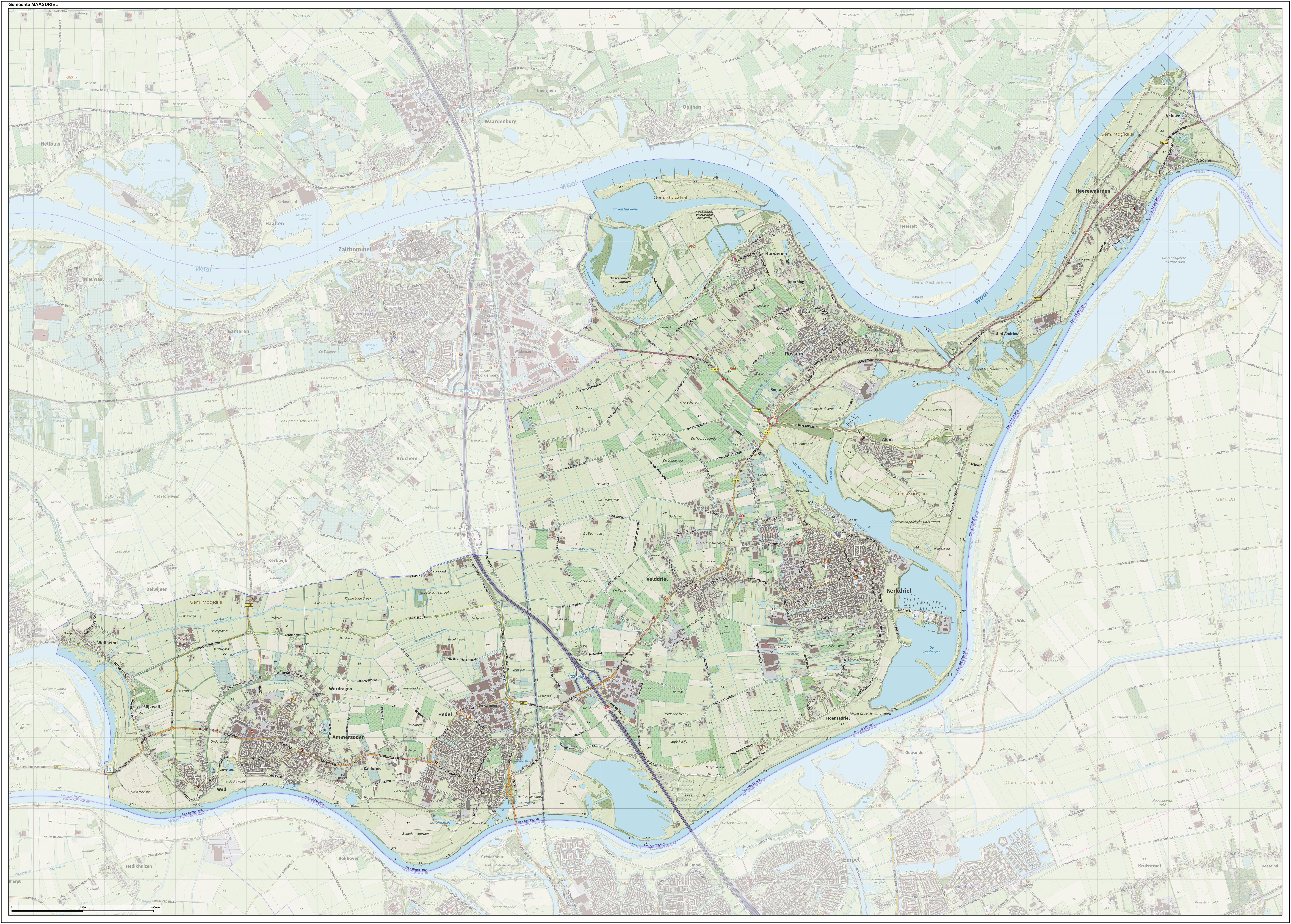 Topografische gemeentekaart. Resolutie: 400 pixels/km. Kaartbeeld samengesteld uit de open geodata van de Top10NL en Top25namen (Kadaster), Creative Commons-BY licentie. Gebouwvlakken uit open geodata BAG extract. Wegen uit de OpenStreetMap, OpenStreetMap community. Reliëfschaduw uit de Actuele Hoogtekaart AHN2. Samenstelling en kleurenschema: Jan-Willem van Aalst, met QGIS. Zie ook de Legenda.